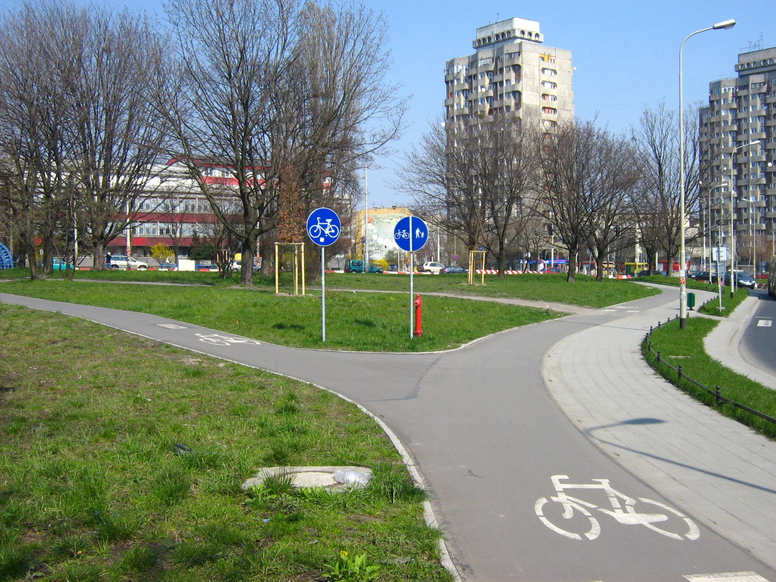 Bicycle path (ścieżka rowerowa), Wybrzeże Wyspiańskiego, Wrocław, Poland